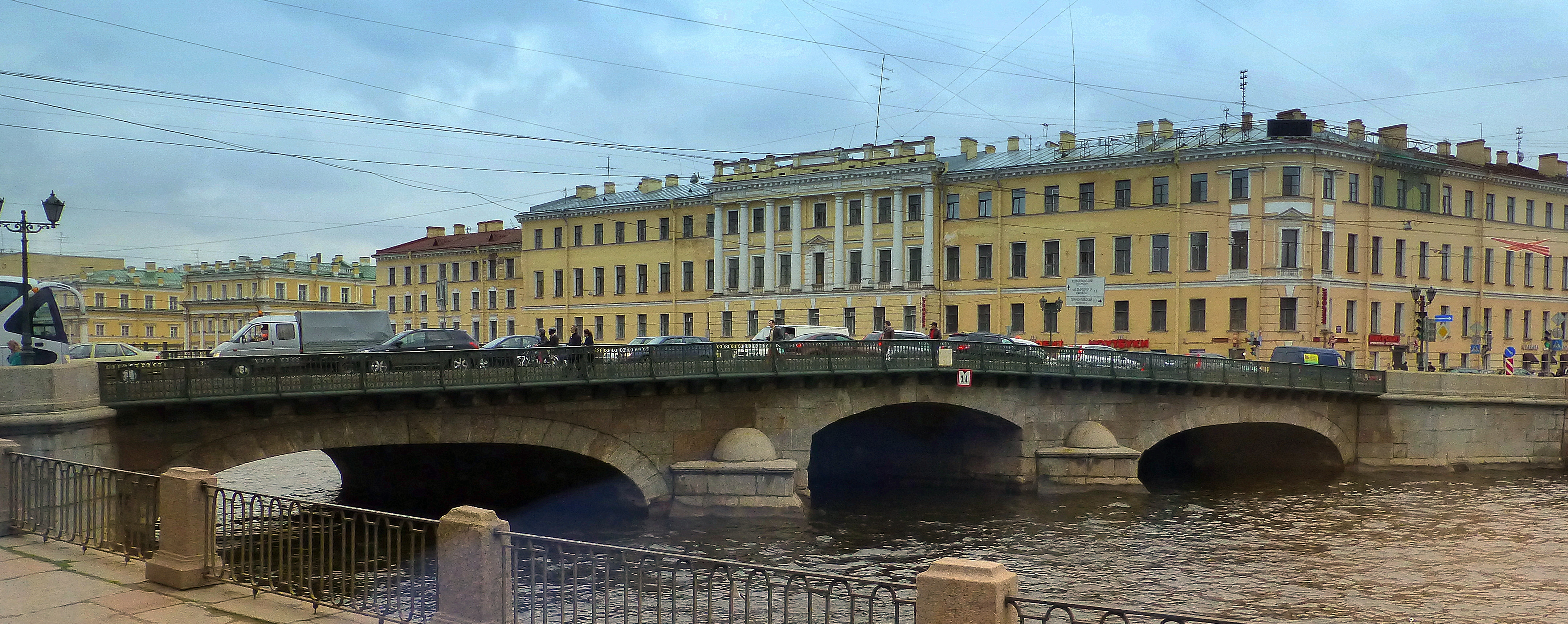 Izmailovsky Bridge --- Измайловский мост